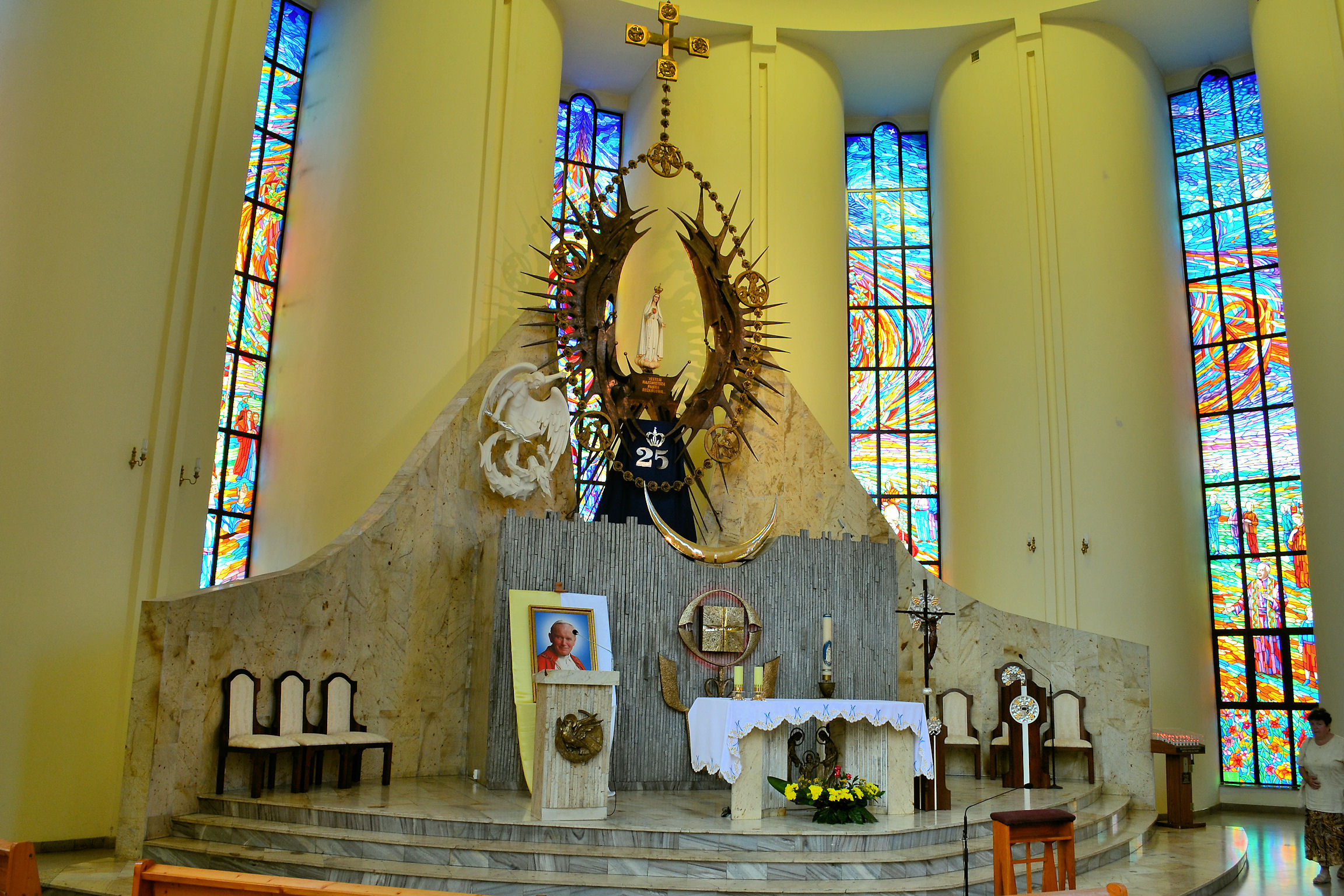 Sanktuarium Matki Bożej Fatimskiej na Os. Słonecznym w Szczecinie